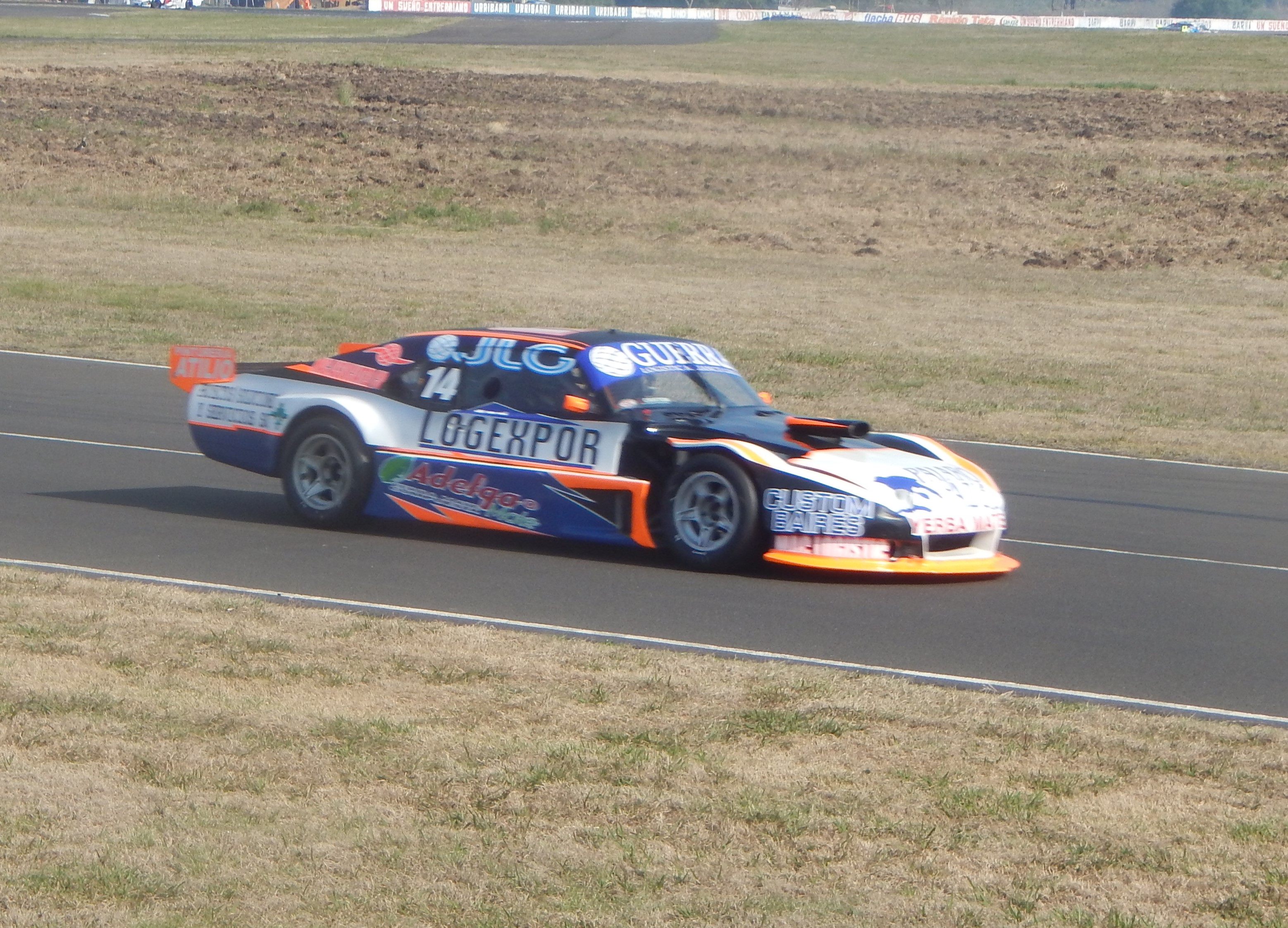 Gastón Ferrante TC Pista en Paraná 2015